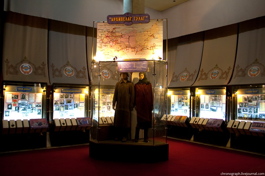 Экспозиция, посвящённая ГУЛАГу, Историко-краеведческий музей им. П. В. Алабина в Самаре